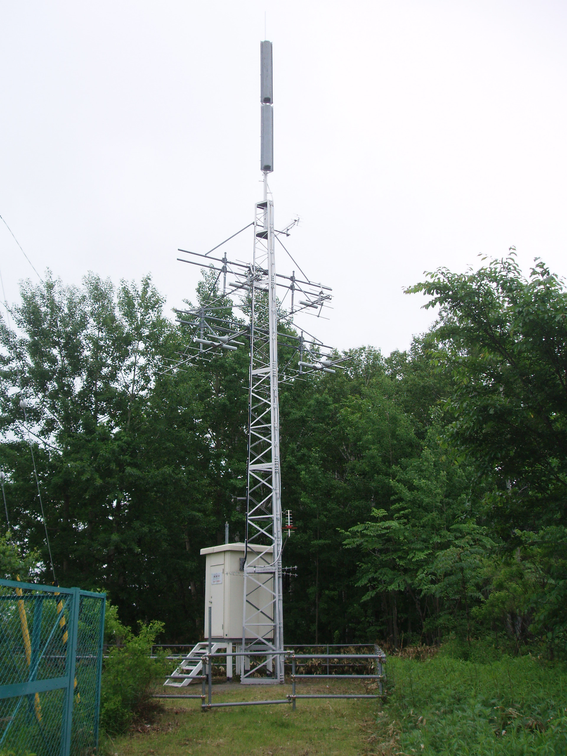 訓子府中継局 NHK送信設備